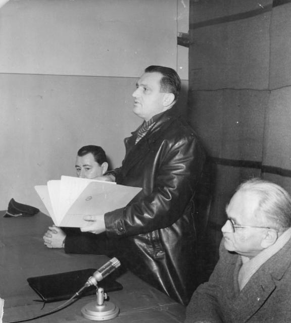 Zentralbild-Junge-6.2.1962. Gefährliche Provokation an der Staatsgrenze der DDR-Durch Agentenschleuse Eisenbahnverkehr aufs äusserste gefährdet. Ein neues eklatantes Beispiel für die friedensgefährdende Rolle der Westberliner Frontstadt-Politik ist am 1.2.1962 auf einer internationalen Pressekonferenz in Berlin enthüllt worden. Vor in- und ausländischen Journalisten, darunter Vertretern westdeutscher Zeitungen informierte der Minister für Verkehrswesen der DDR, Erwin Kramer, auf dem Gelände des S-Bahnhofes Wollankestrasse über die ungeheuerliche Tatsache, dass Westberliner Banditen unter gröbster Verletzung der Staatsgrenze der DDR durch die Gewölbe dieses Bahnhofes ein Stollensystem vorgetrieben haben. Durch die Anlage dieses Stollensystems sollten Agenten und Diversanten von Westberlin in das Gebiet der DDR eingeschleust werden. UBz: Während der Pressekonferenz der Leiter des Presseamtes beim Vorsitzenden des Ministerrats der DDR, Kurt Blecha (stehend), rechts der Minister für Verkehrswesen der DDR Erwin Kramer.